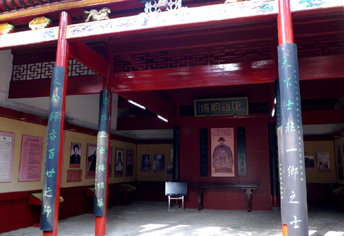 长沙船山学社